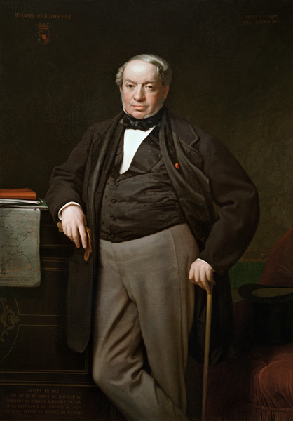 James Mayer de Rothschild (1792-1868)